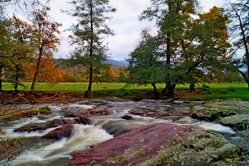 Врачански Балкан, Вършец е курортен град разположен във Врачански балкан в неговите западни покрайнини. Природата тук е уникално красива.